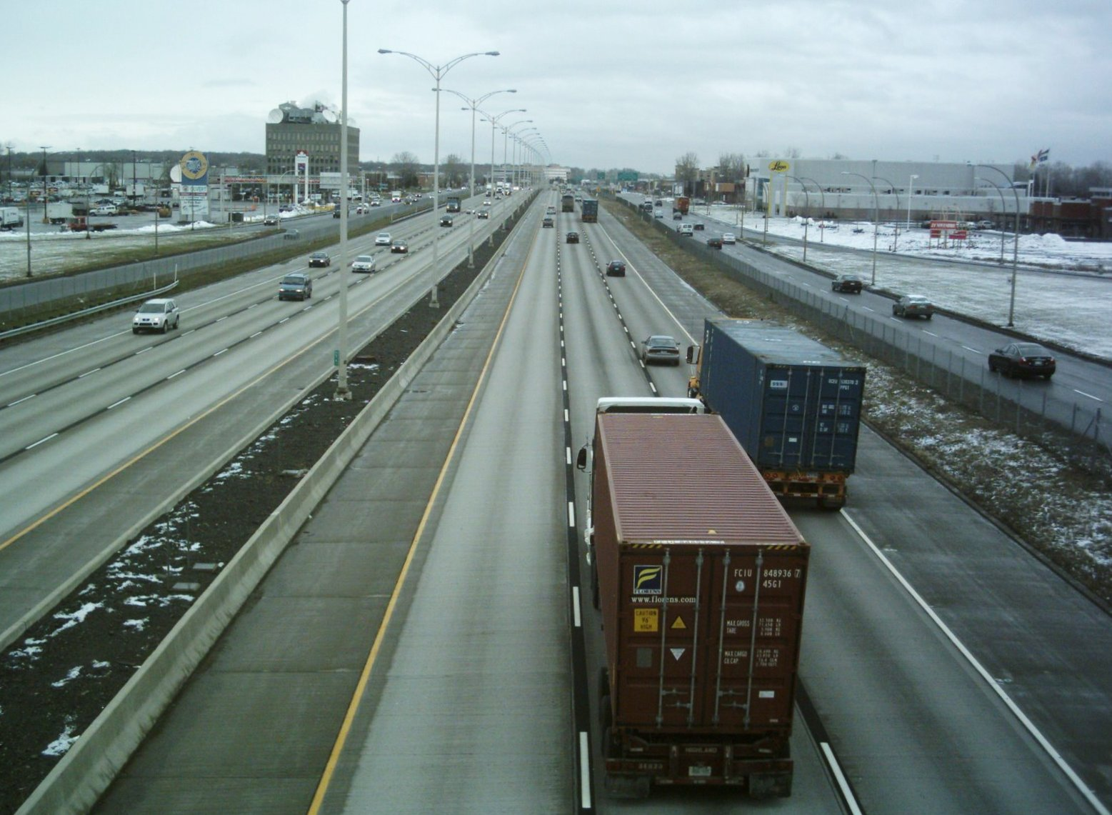 L'autoroute 40 à Montréal, vue du boulevard des Sources.